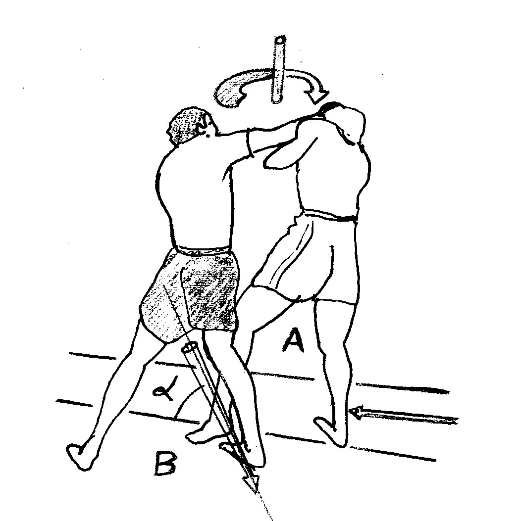 deborder1.jpg